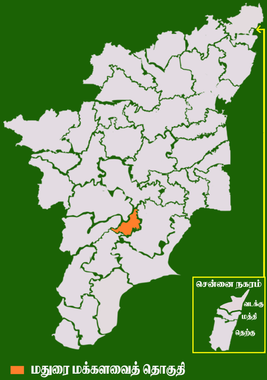 தமிழக வரைபடத்தில் உள்ள மதுரை மக்களவைத் தொகுதி